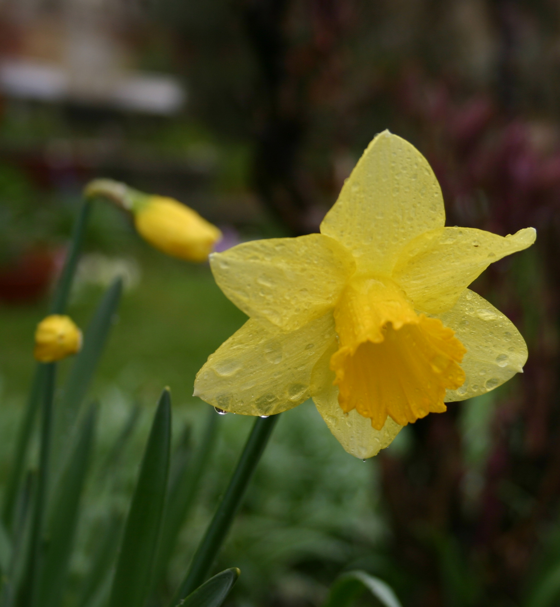 Daffodil. Photo by Bertil Videt, 2005.